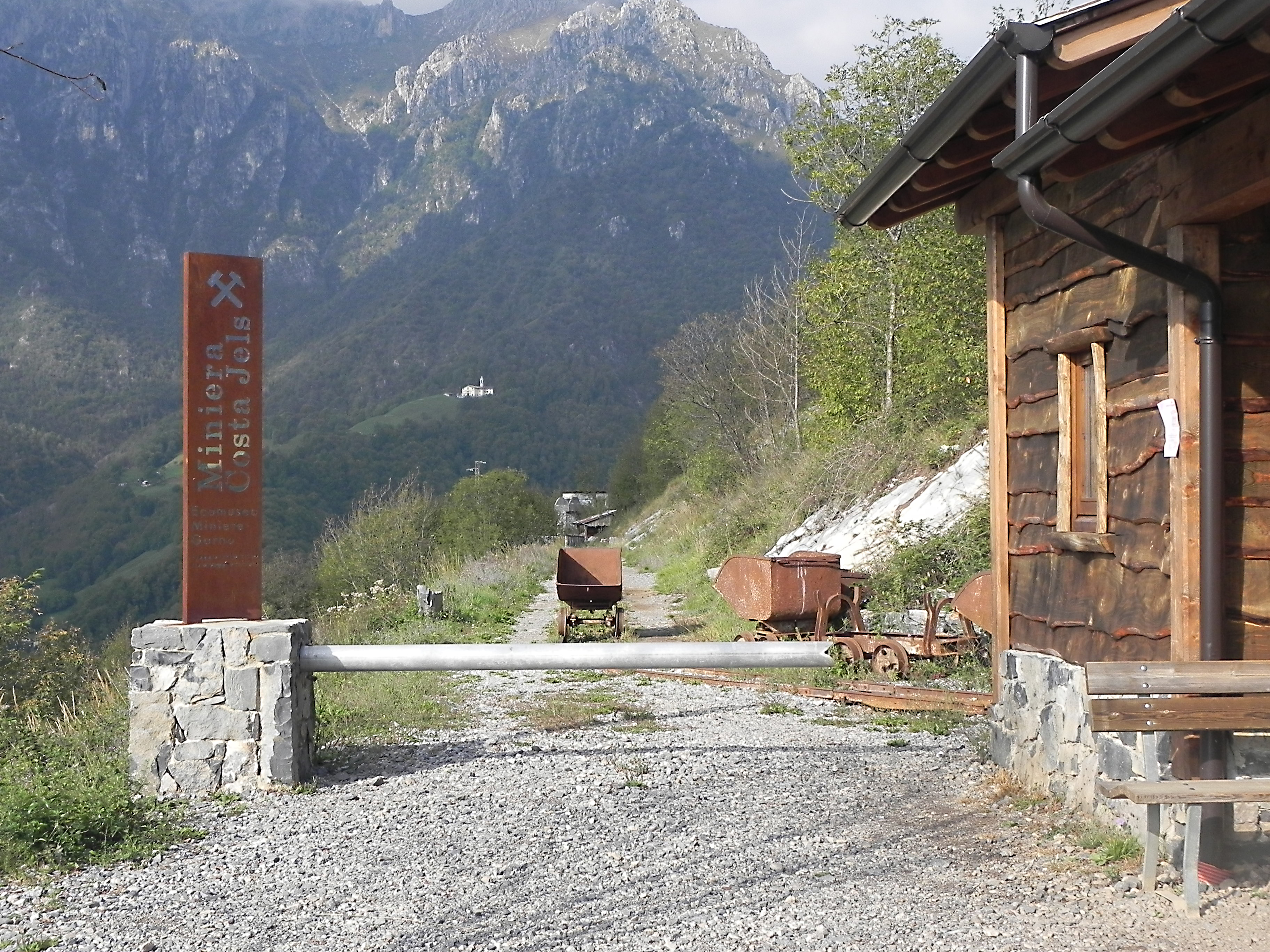 Ingresso al sito di Costa Jels dell'Ecomuseo di Gorno in Val del Riso (BG) Italy